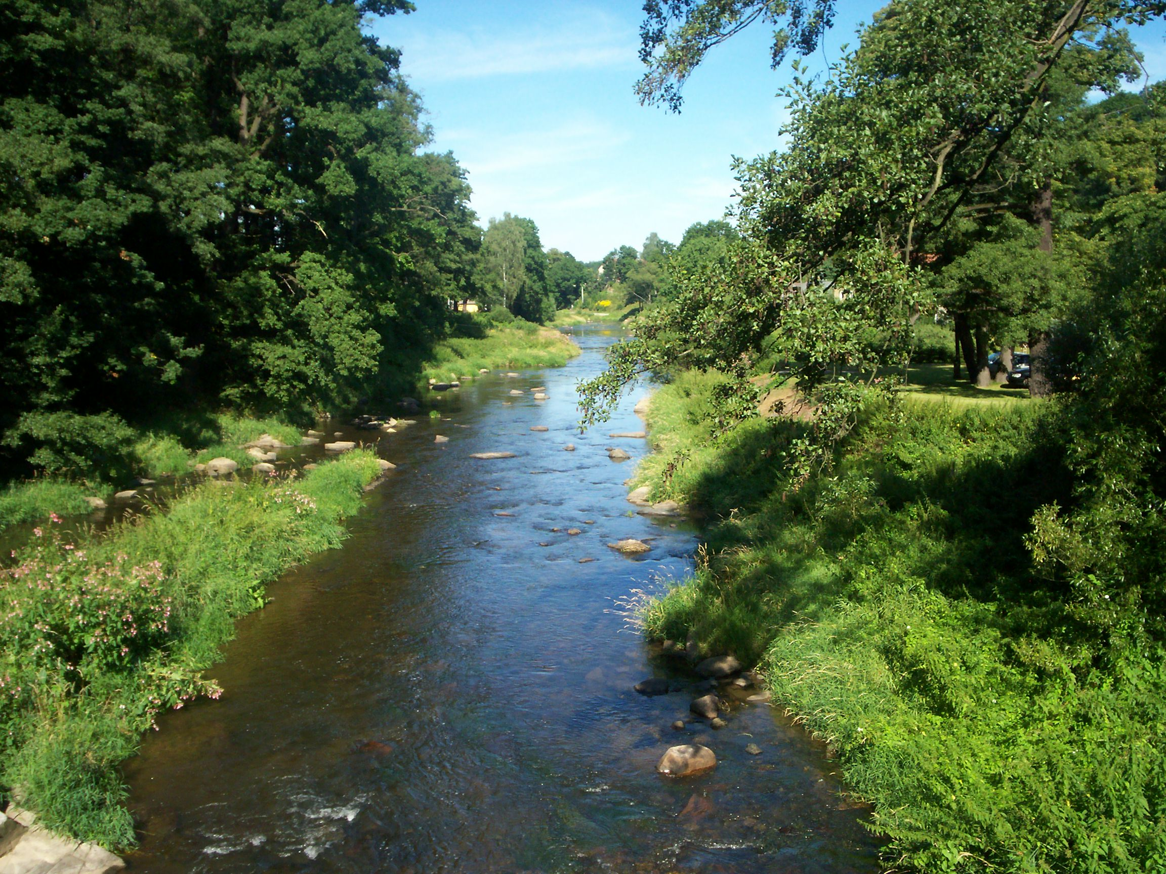 Janowice Wielkie, rzeka Bóbr.